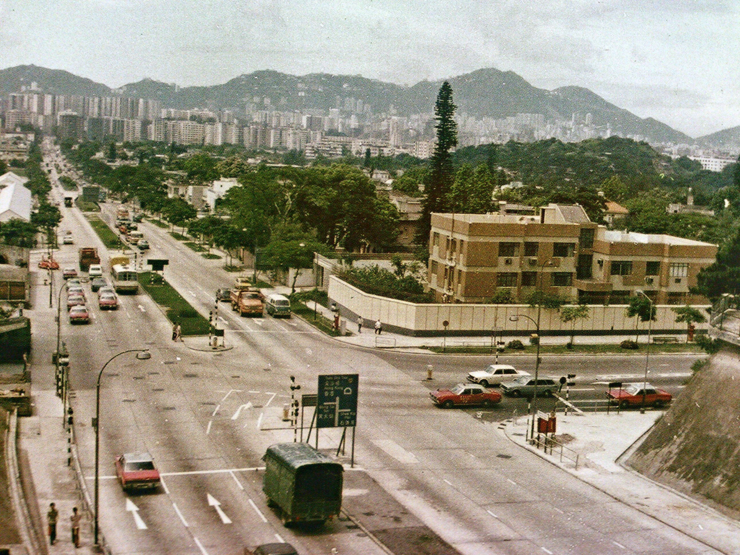 Beacon Hill, Hong Kong